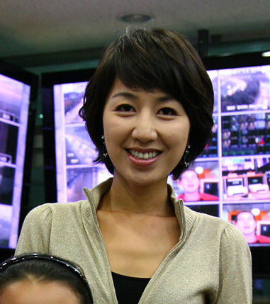 KBS 기상 캐스터 - 한희경 님!